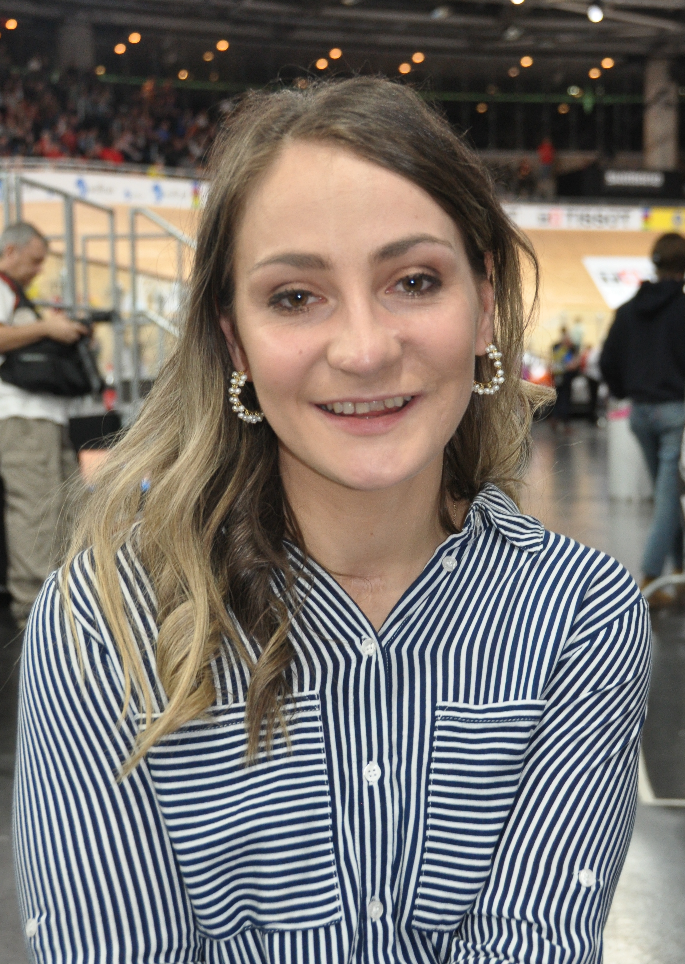 Kristina Vogel, deutsche Radsportlerin